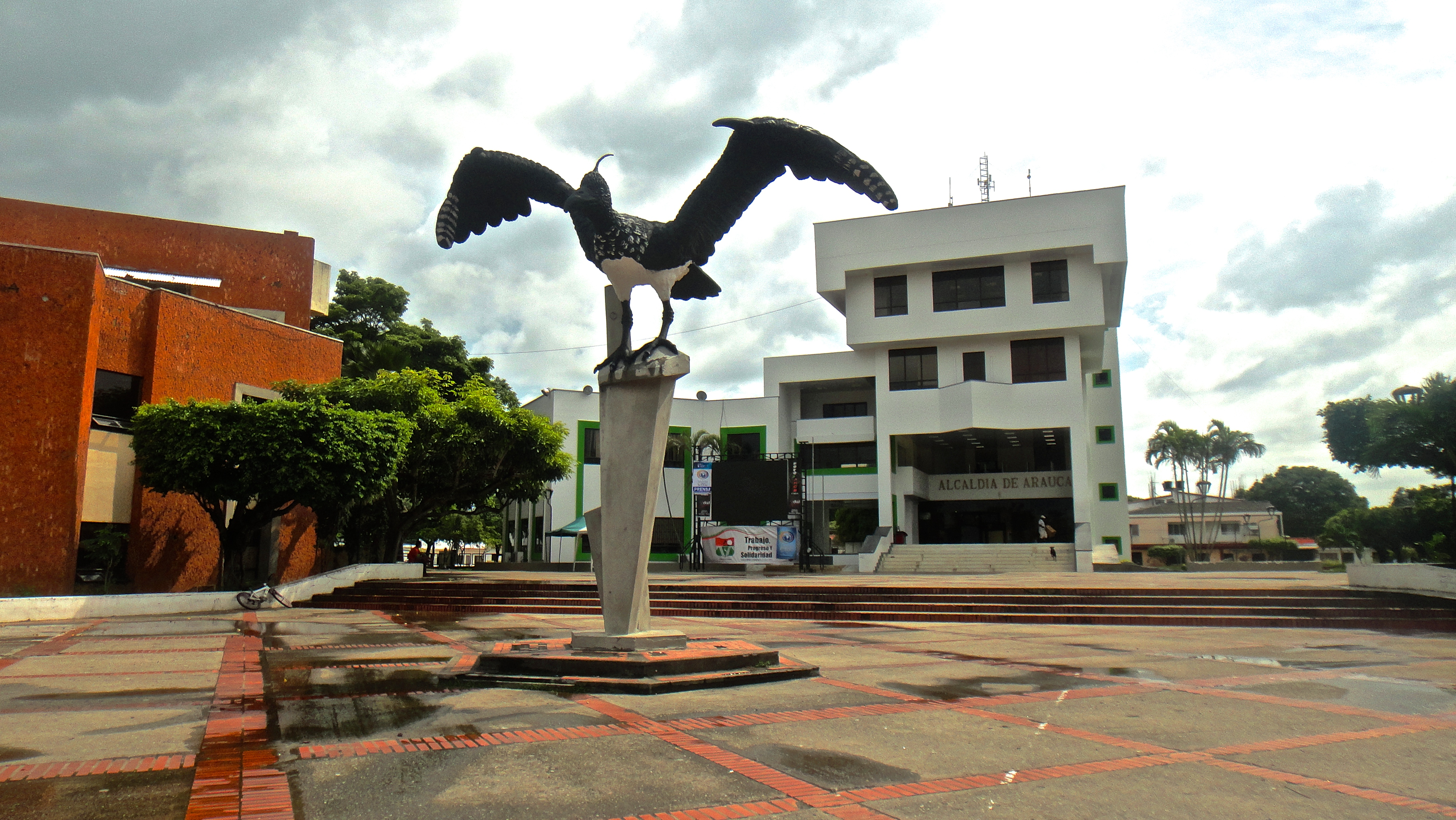 Ubicación: ARAUCA, ARAUCA